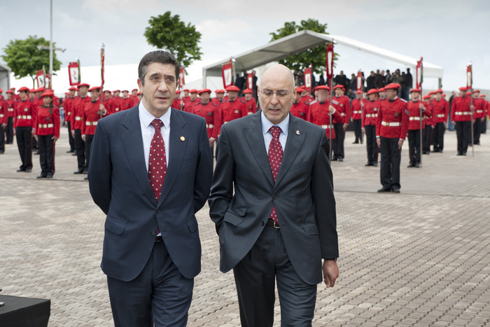 El 16 de mayo de 2010, la Ertzaintza celebró por primera vez el día de la Ertzaintza en la Base Central de la Campa de Erandio. El lehendakari Patxi López y el consejero de Interior Rodolfo Ares protagonizaron el acto. En el mismo homenajearon a los policías muertos. Los sindicatos de la Ertzaintza y Ezker Batua se negaron a asistir. Distintas fuentes de información situaron el número de participantes entre mil y dos mil.)